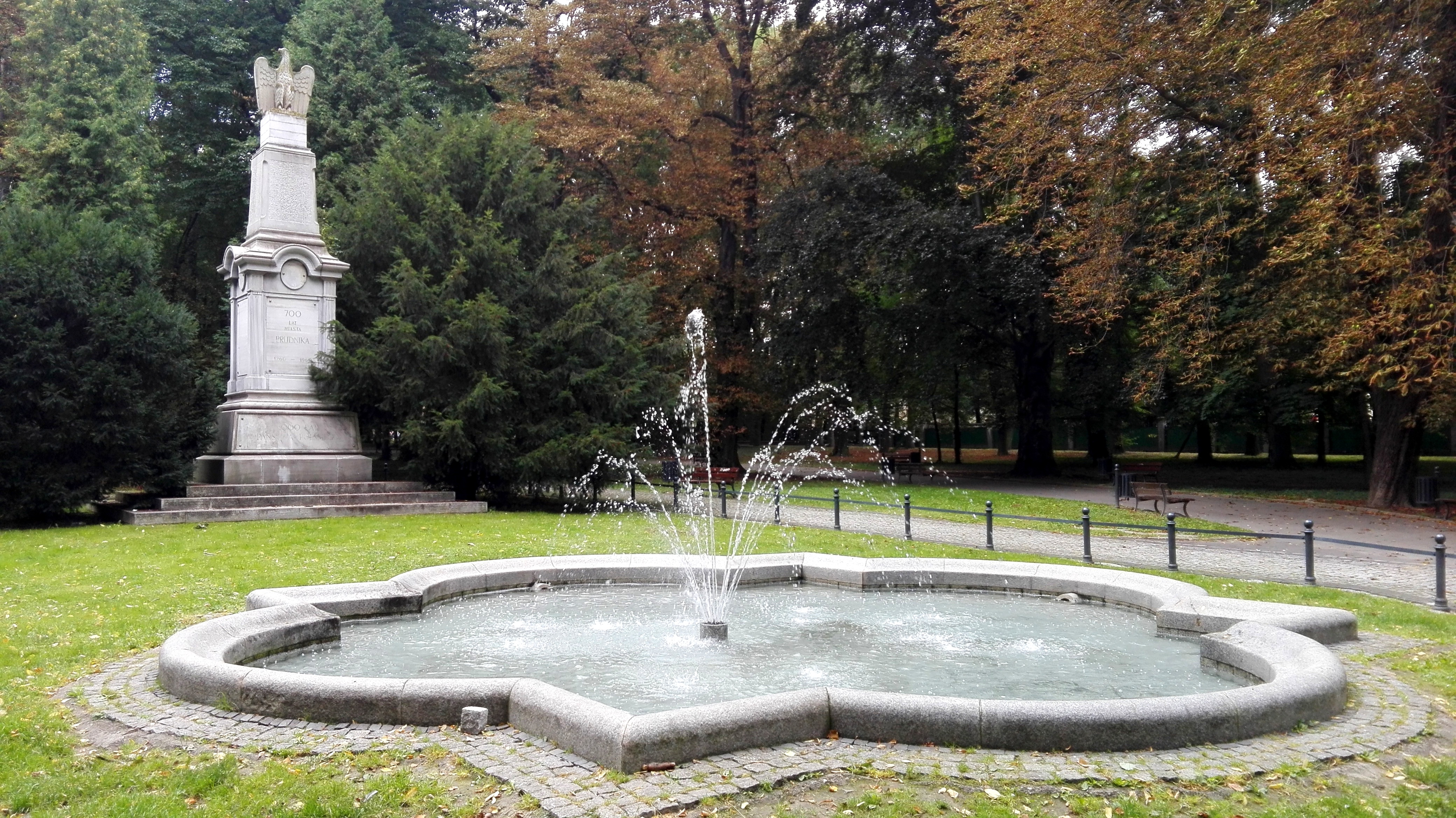 Prudnik, pomnik upamiętniający 700-lecie powstania miasta Prudnika i 1000-lecia powstania Państwa Polskiego z fontanną, park miejski, k. XIX Prudnik